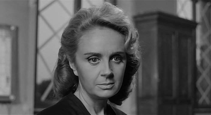 Maria Laura Gayno in L'oro di Roma,(1961), diretto da Carlo Lizzani.